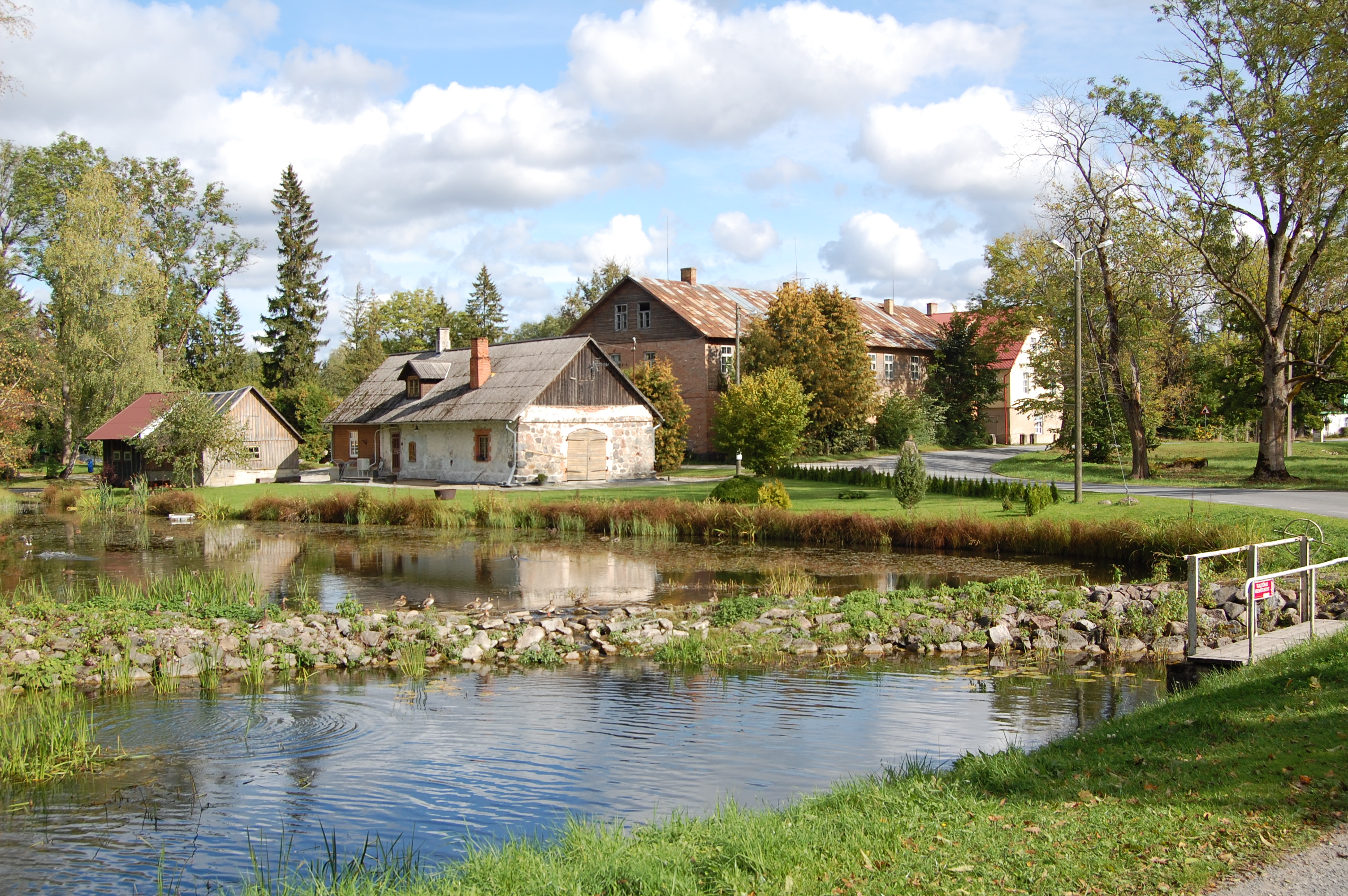 Lustivere küla Põltsamaa vallas 2019. aasta septembris